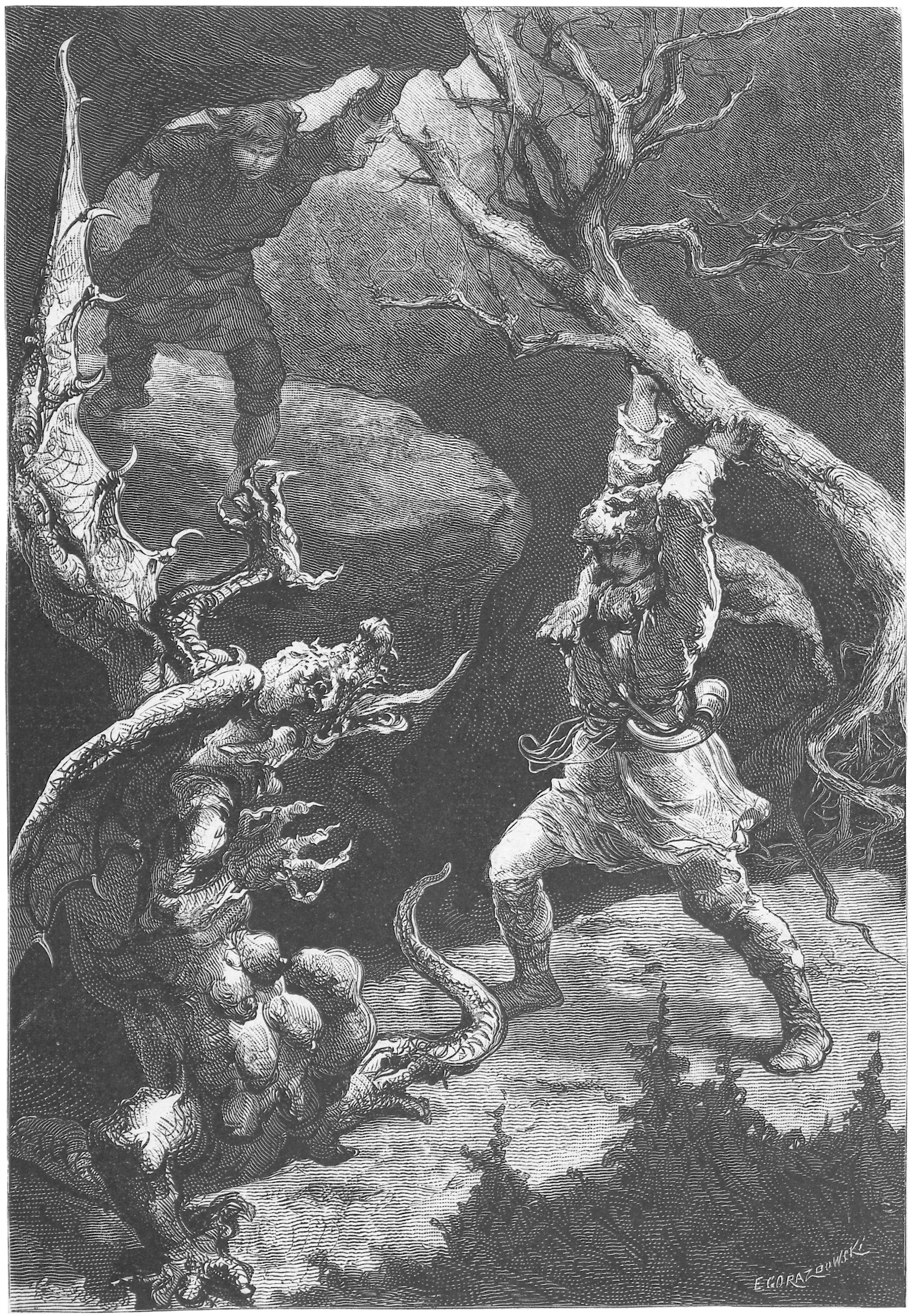 Waligóra i Wyrwidąb, drzeworyt wg rys. M. E. Andriollego, ryt. Edward Gorazdowski; ilustracja do książki PL Kazimierz Władysław Wójcicki "Klechdy, starożytne podania i powieści ludowe", 1876